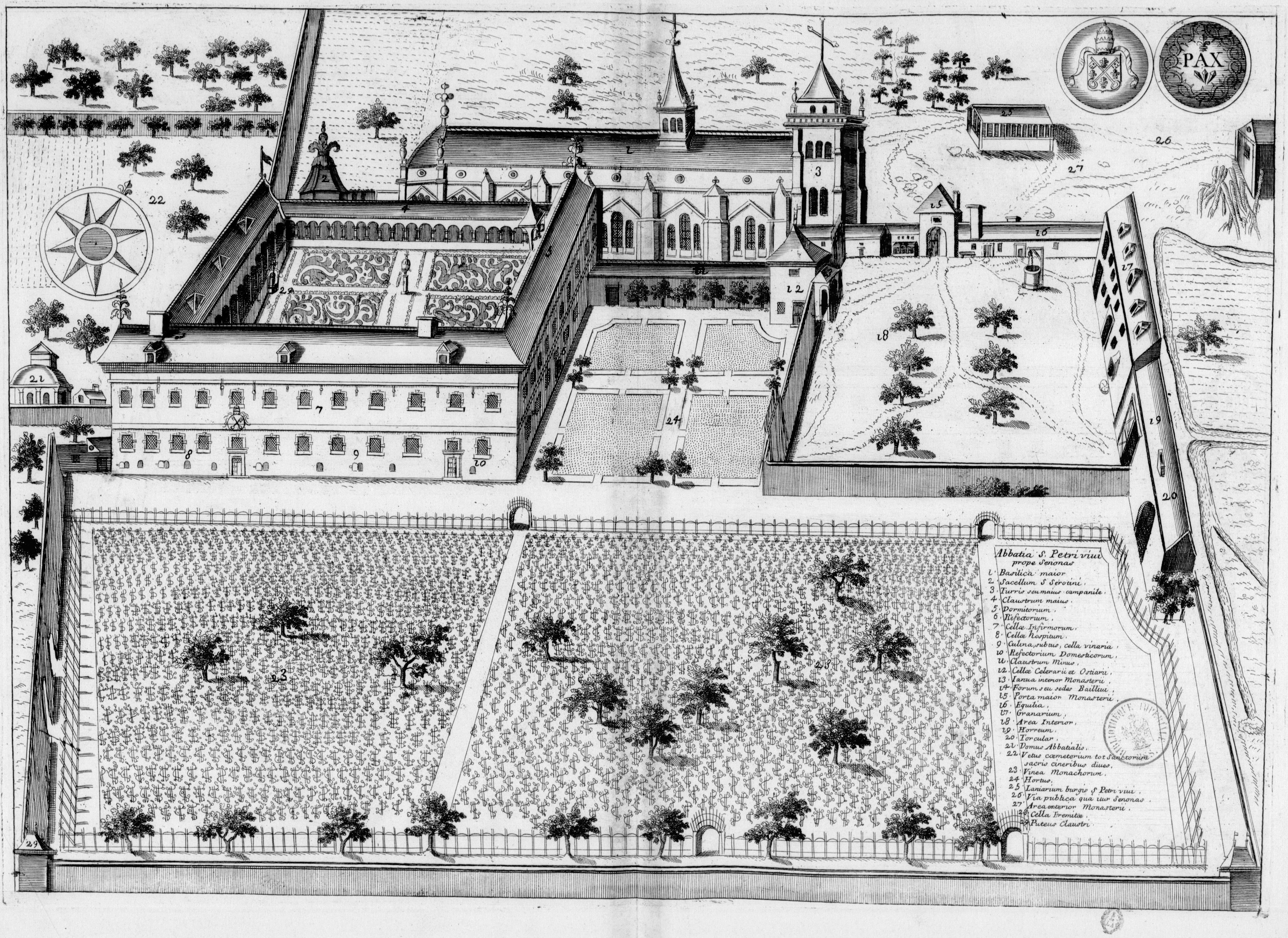 Planche gravée du 17ème siècle représentant l'abbaye Saint-Pierre-le-Vif de Sens, en France, dans le livre Monasticon Gallicanum.